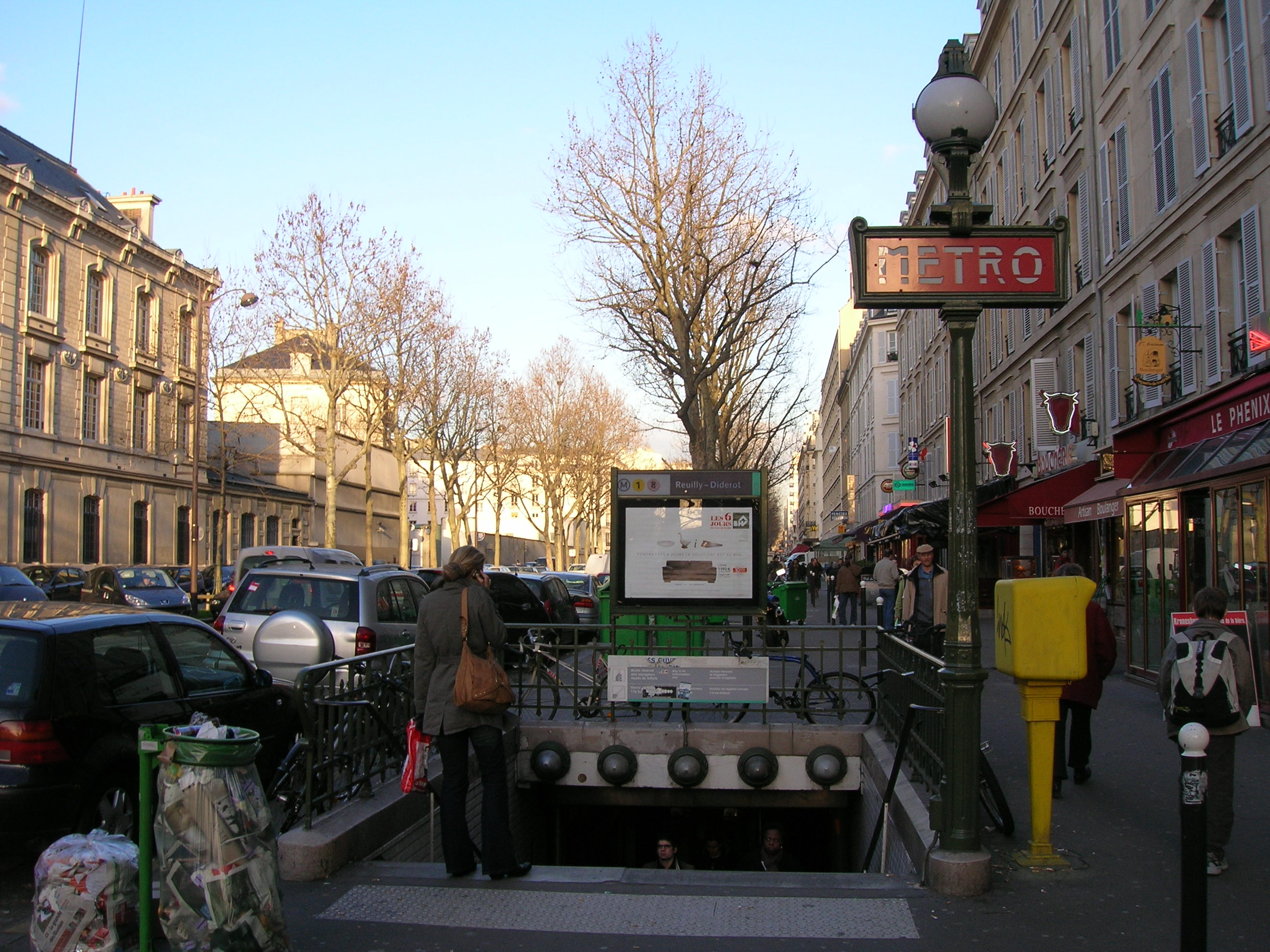 L'entrée côté rue de Chaligny de la station Reuilly - Diderot des lignes 1 et 8 du métro de Paris, France